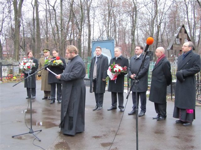 Церемонія відкриття меморіальної дошки Климентію Шептицькому на Князь-Владимирському цвинтарі у Владимирі 30 жовтня 2010 року.